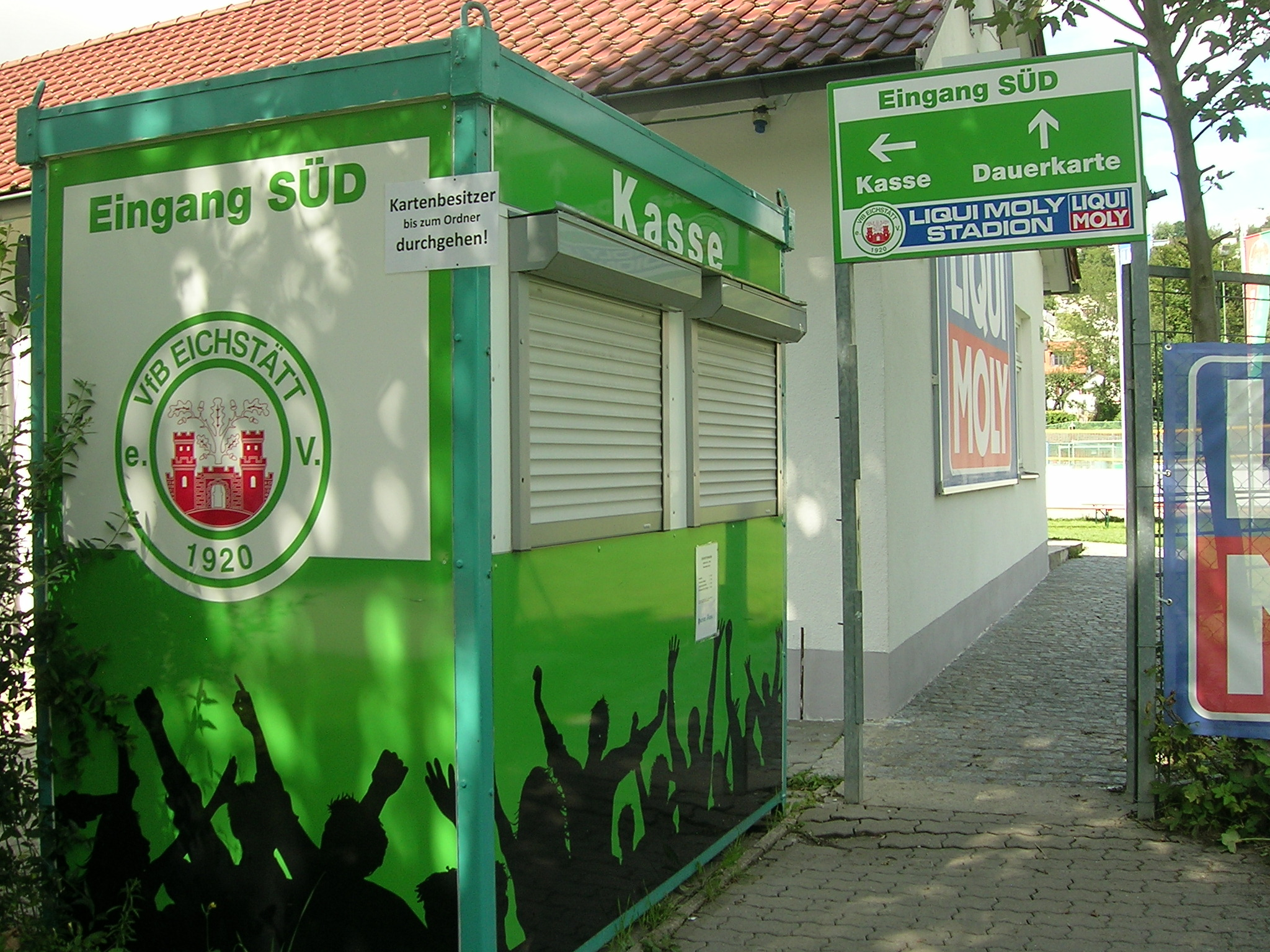 Stadion VfB Eichstätt 2017, Eingang Süd